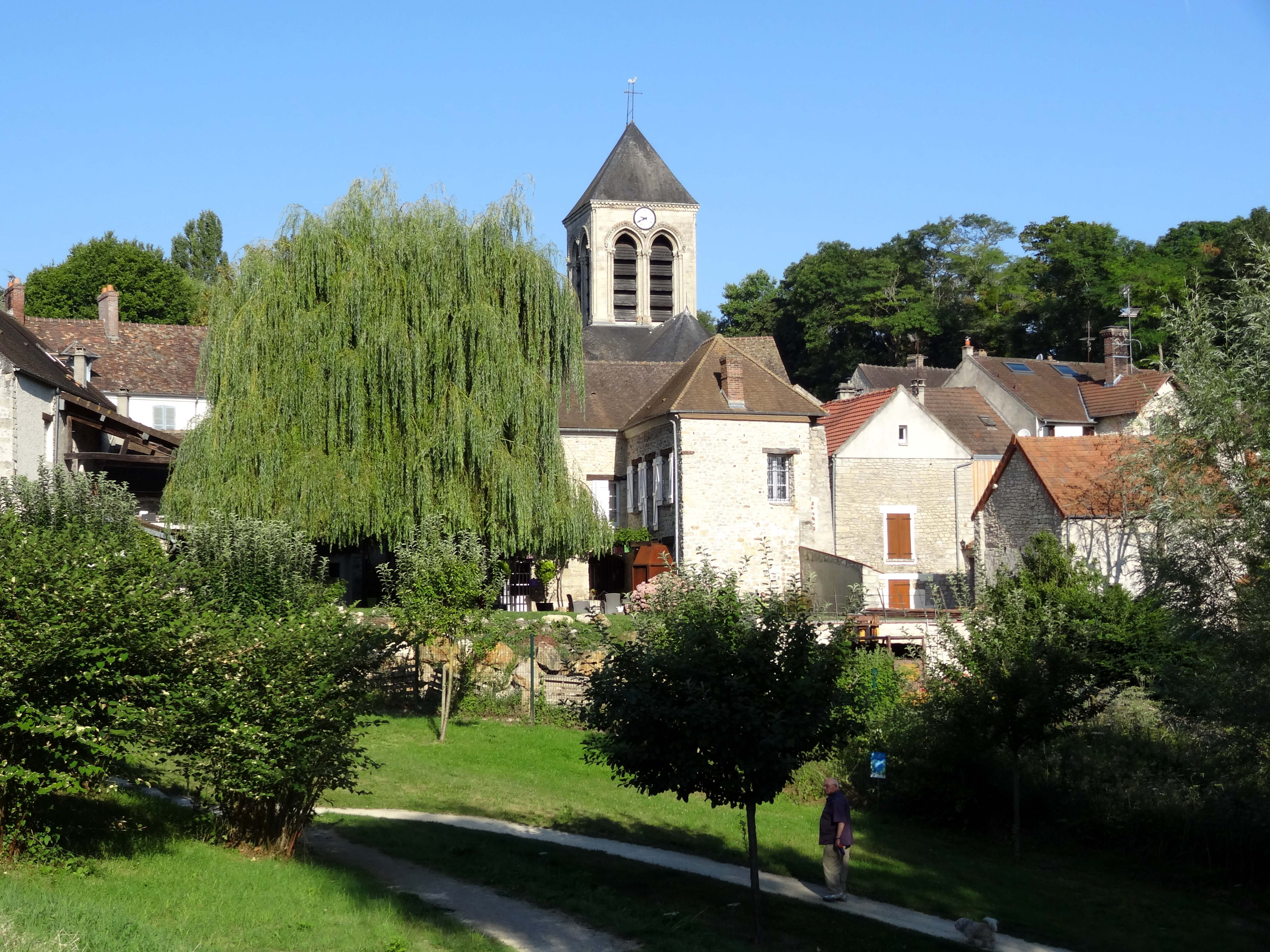 Église Saint-Séverin d'Oinville-sur-Montcient - voir titre.